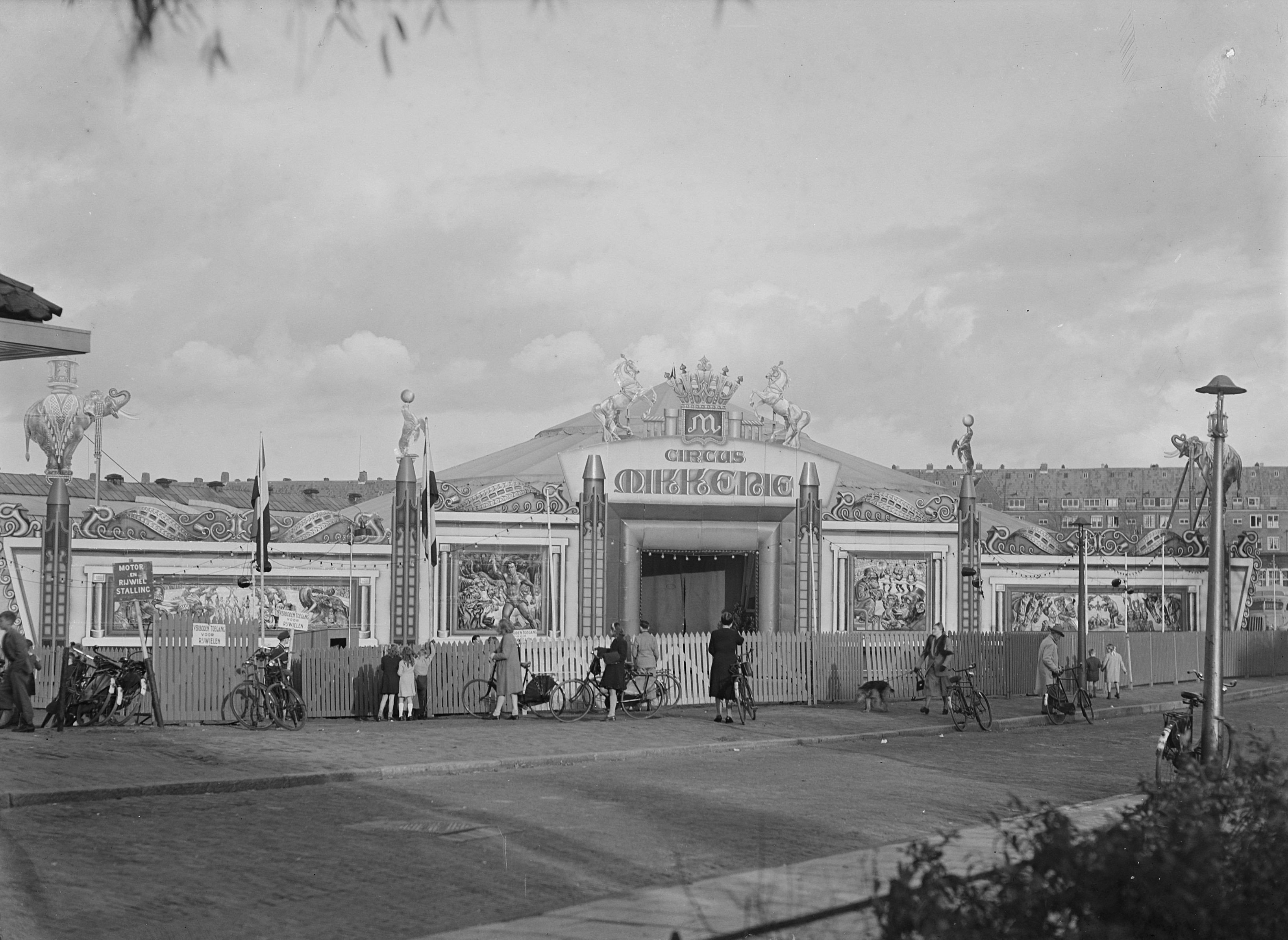 Collectie / Archief : Fotocollectie Anefo Reportage / Serie : [ onbekend ] Beschrijving : Circus Mikkenie . Exterieur tent Datum : 9 november 1948 Trefwoorden : exterieur, tenten Instellingsnaam : Circus Mikkenie Fotograaf : Bilsen, Joop van / Anefo Auteursrechthebbende : Nationaal Archief Materiaalsoort : Glasnegatief Nummer archiefinventaris : bekijk toegang 2.24.01.09 Bestanddeelnummer : 903-0901